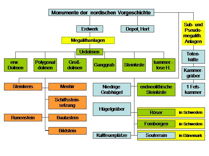 Monumente im Nordkreis